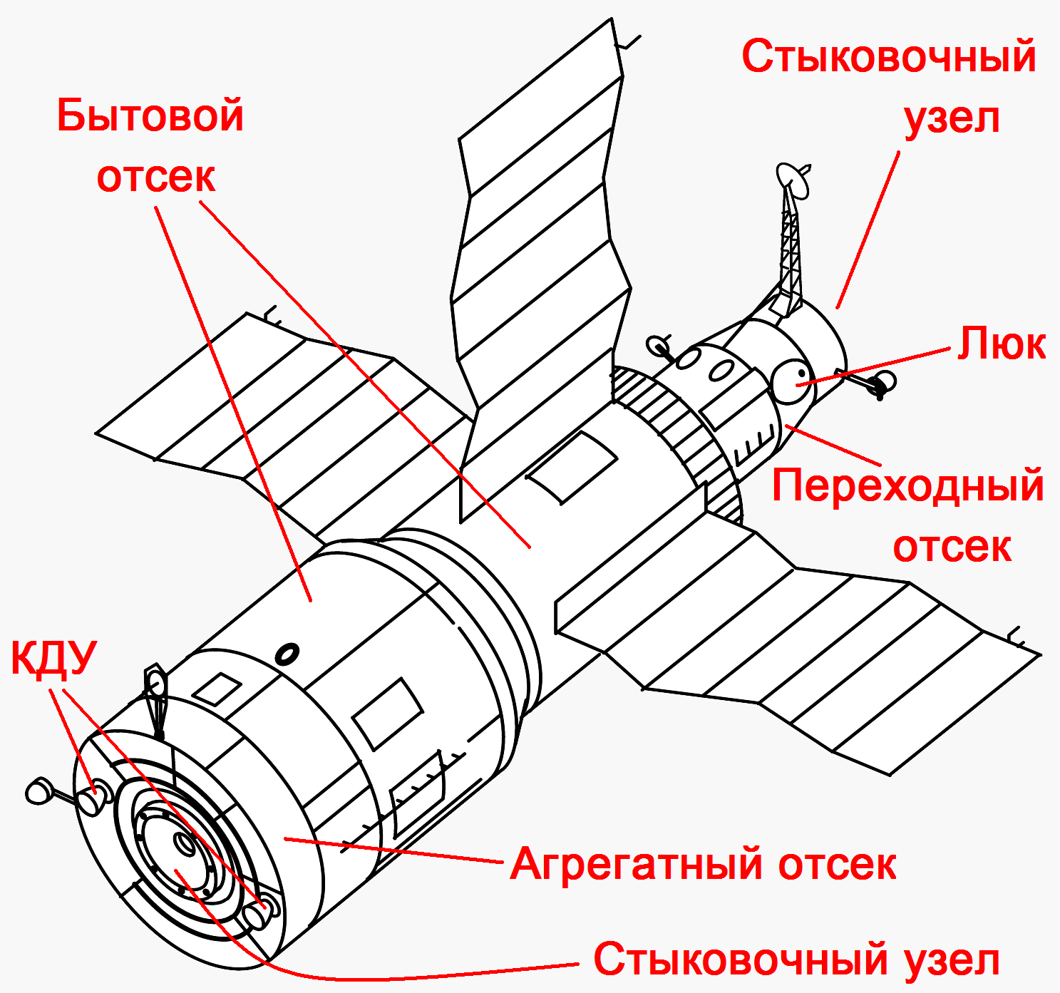 Салют-6